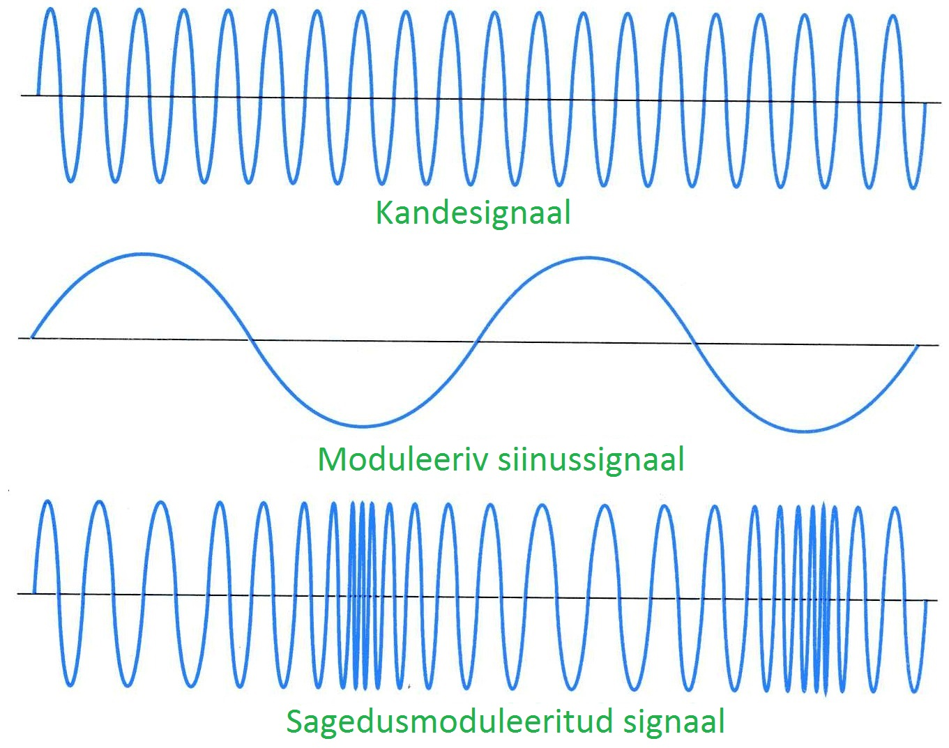 Sagedusmodulatsioon (FM)